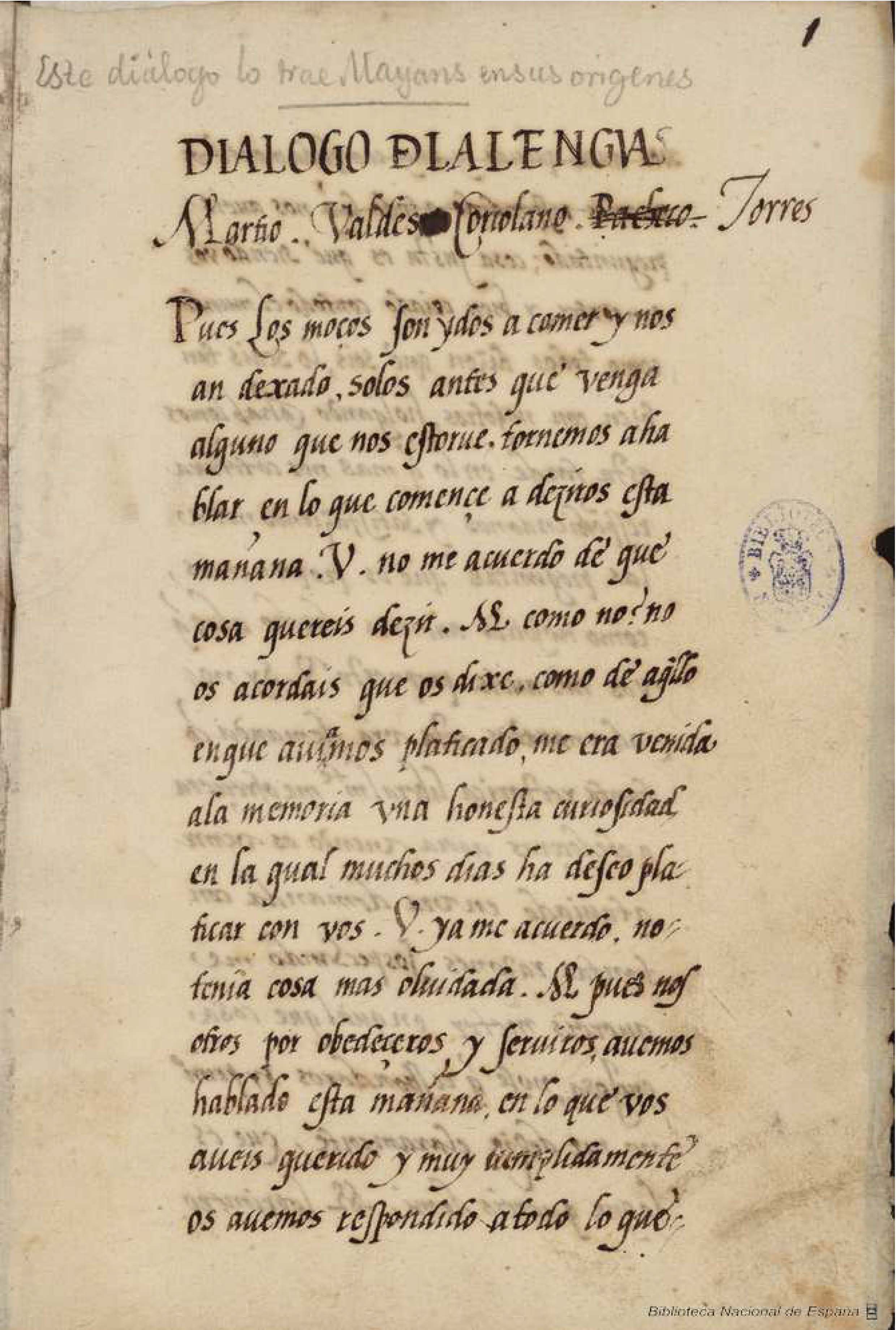 Diálogo de la lengua [Manuscrito]. - S.XVI. - I, 98 h. ; 22 x 16 cm. Signatura Mss/8629